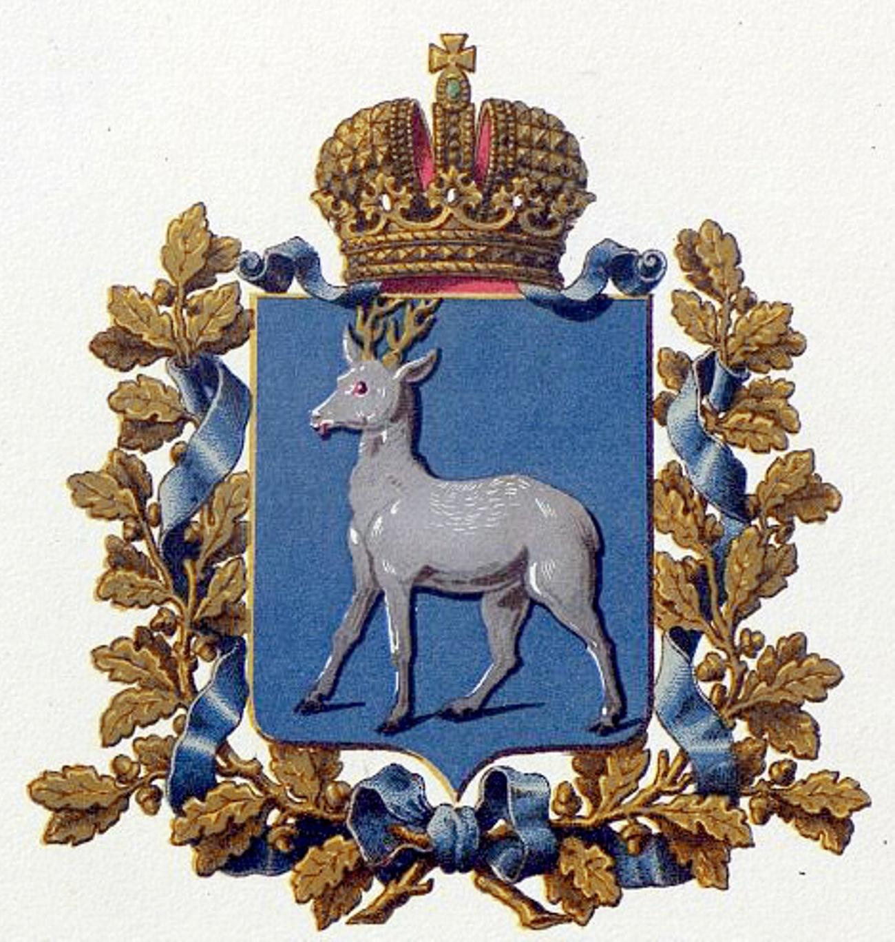 Official Russian Empire coat of arms Samara Governorate. Герб Российской Империи Самарской губернии в Гербовнике МВД. Утверждён Императором Всероссийским Александром Вторым.